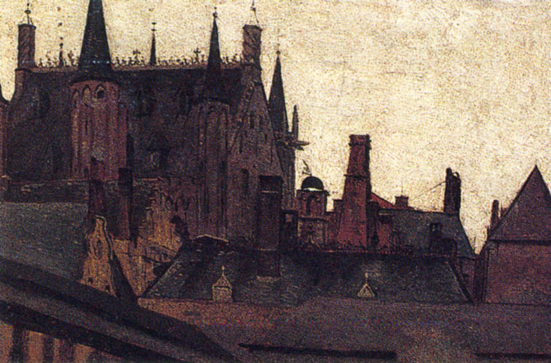 Pintura tejados de París museo de bellas artes